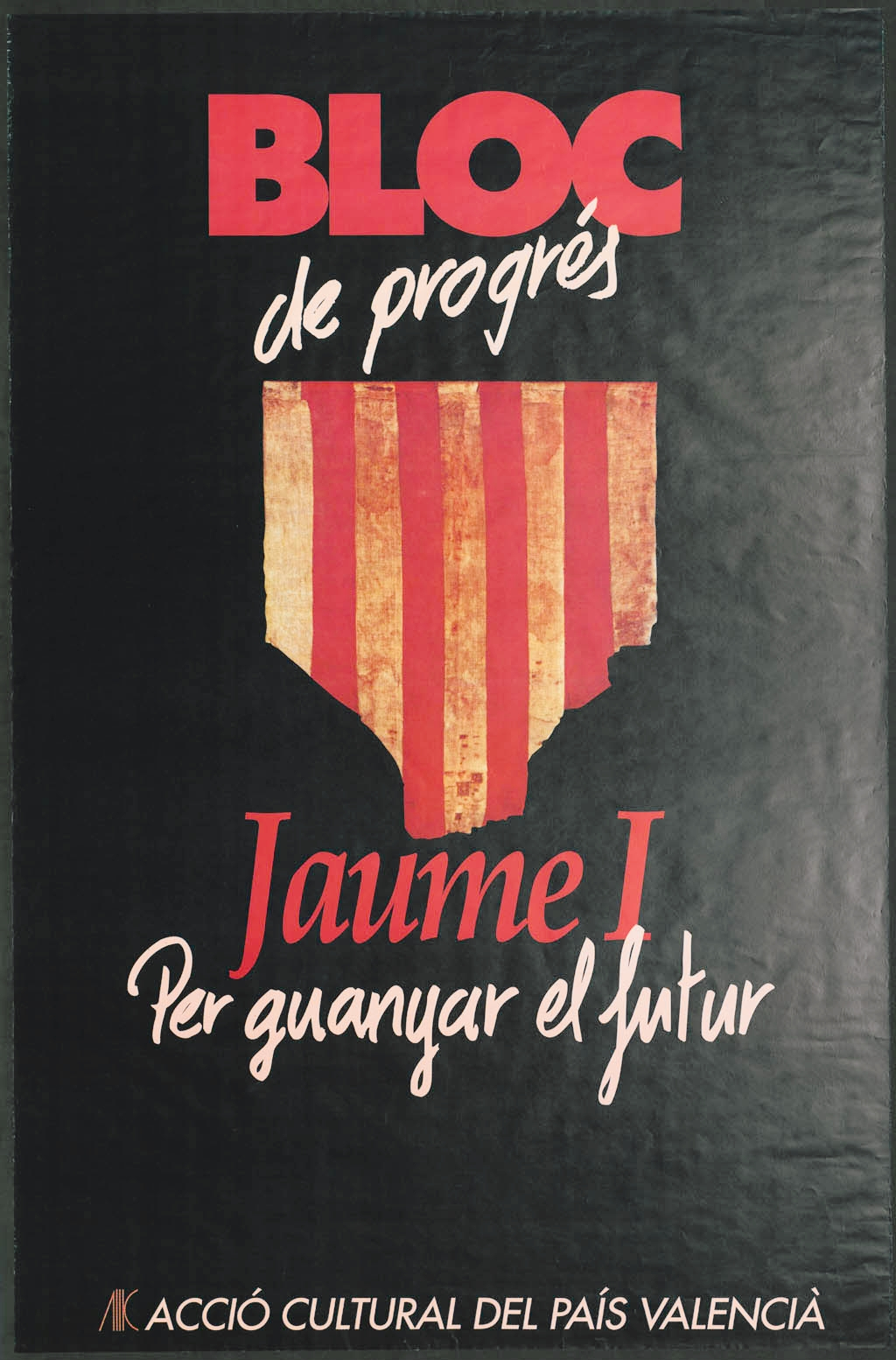 Cartell del Bloc de Progrés Jaume I